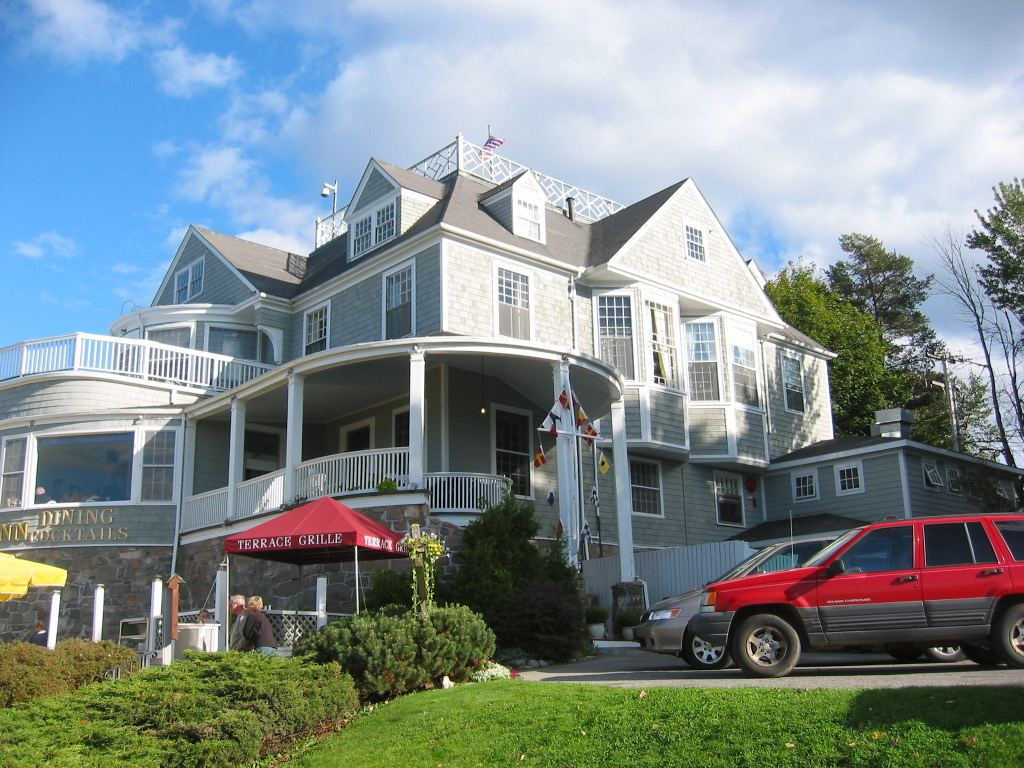 Bar Harbor Inn, 2006